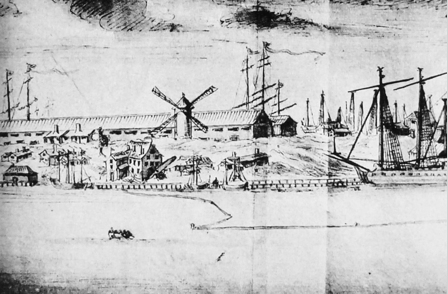 Del av vy över Skepps- och Kastellholmarna av Lorenzo Magalotti omkr 1674. Magalotti var en florentinsk diplomat som besökte Stockholm detta år. I mitten syns Skeppskomskvarnen (på platsen för nuvarande Skeppsholmskyrkan)